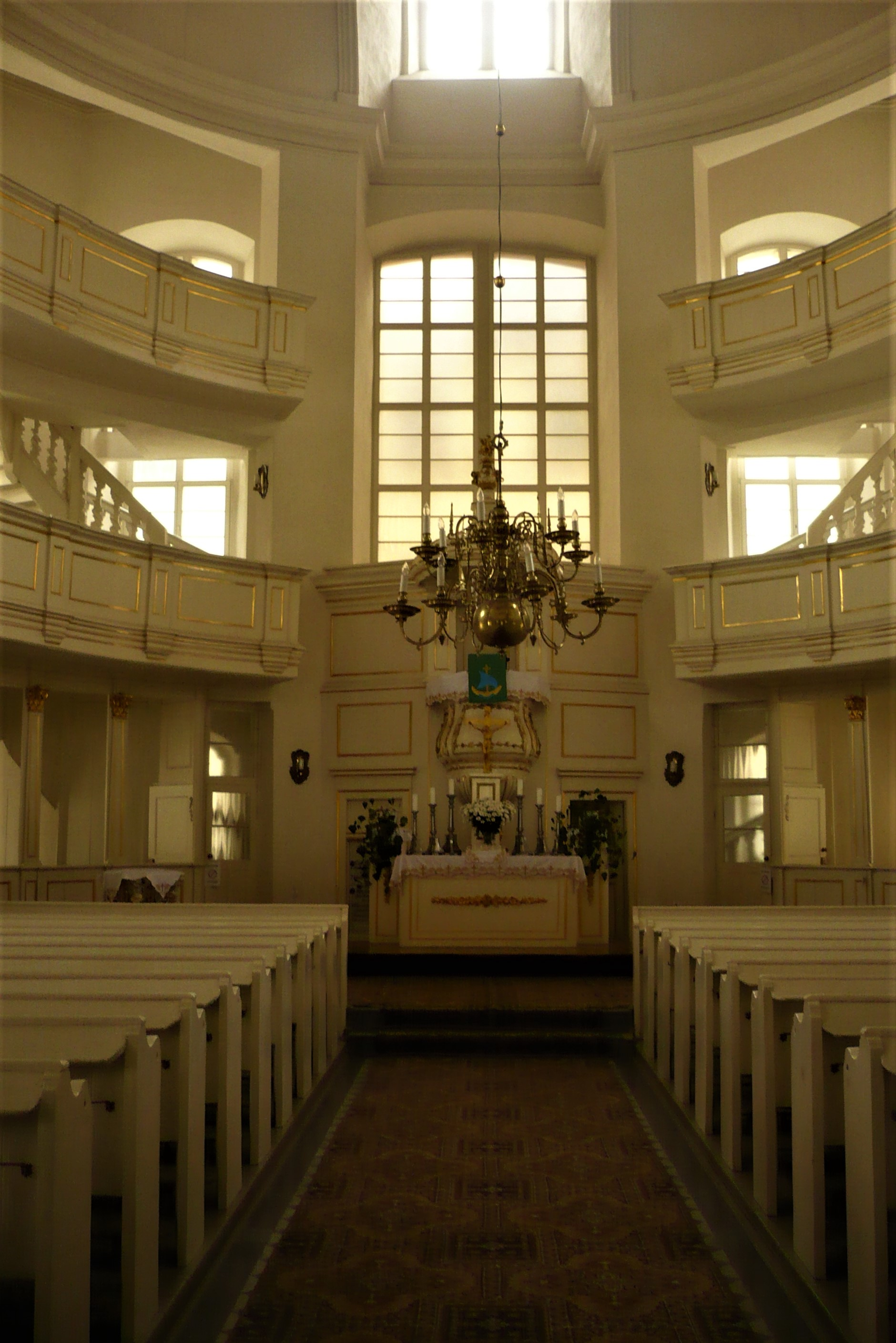 Kościół Opatrzności Bożej we Wrocławiu